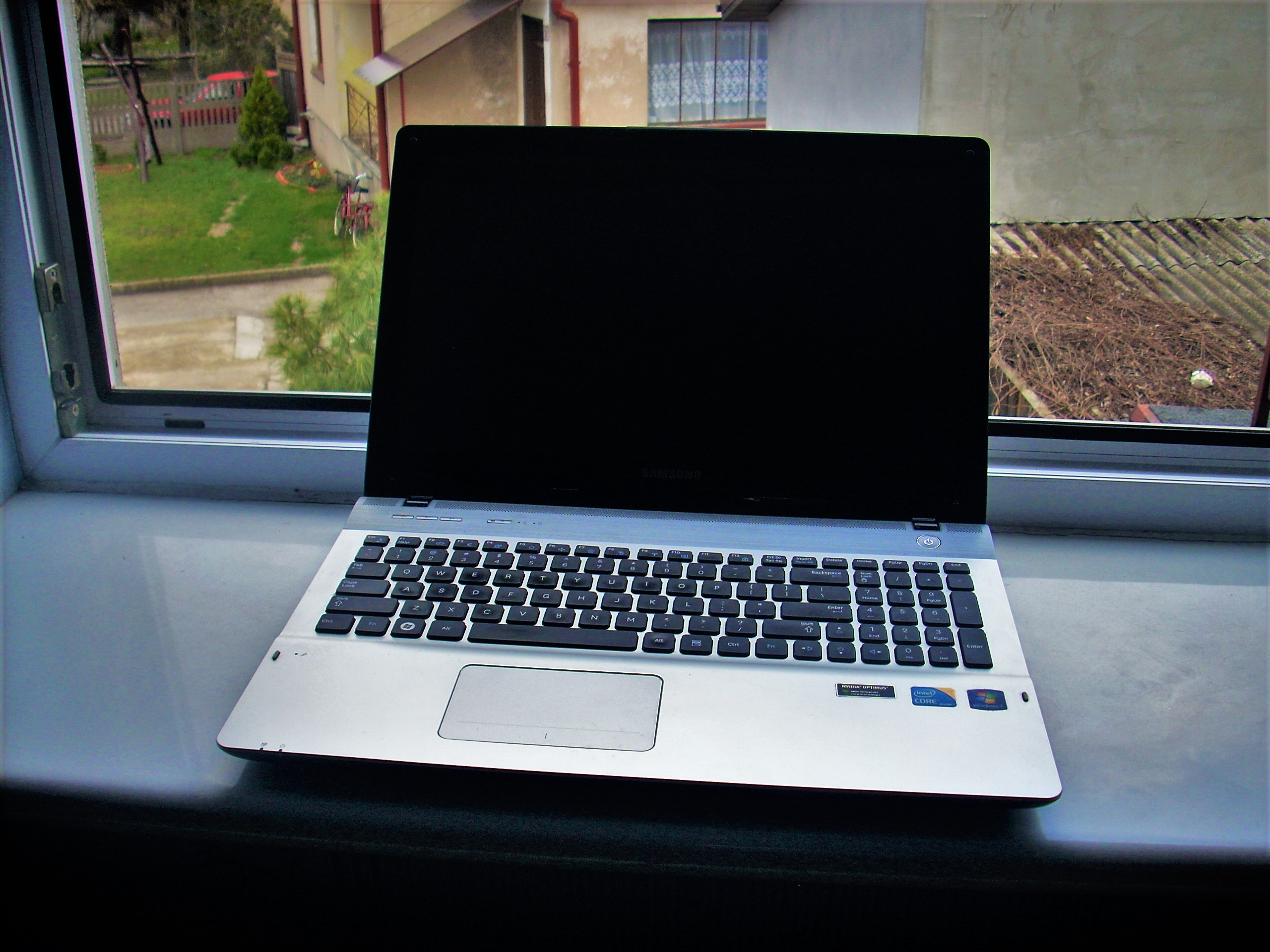 Komputer - laptop (notebook) Samsung QX-510 - wnętrze